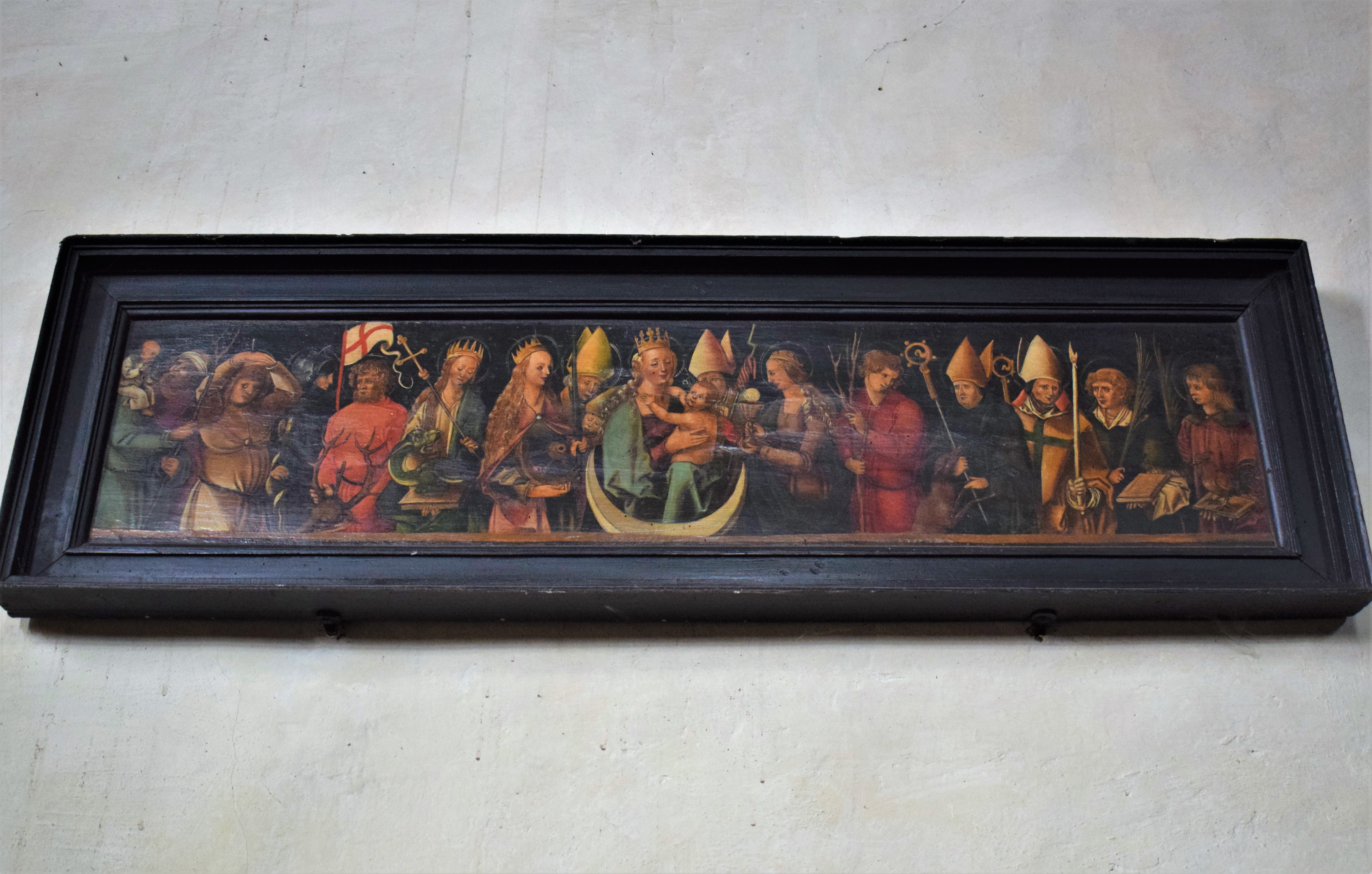 Rieterkirche Kalbensteinberg, Gemälde an der Langhaus-Südwand: Die 14 Nothelfer mit Maria und Jesuskind (Anfang 16. Jhd.)